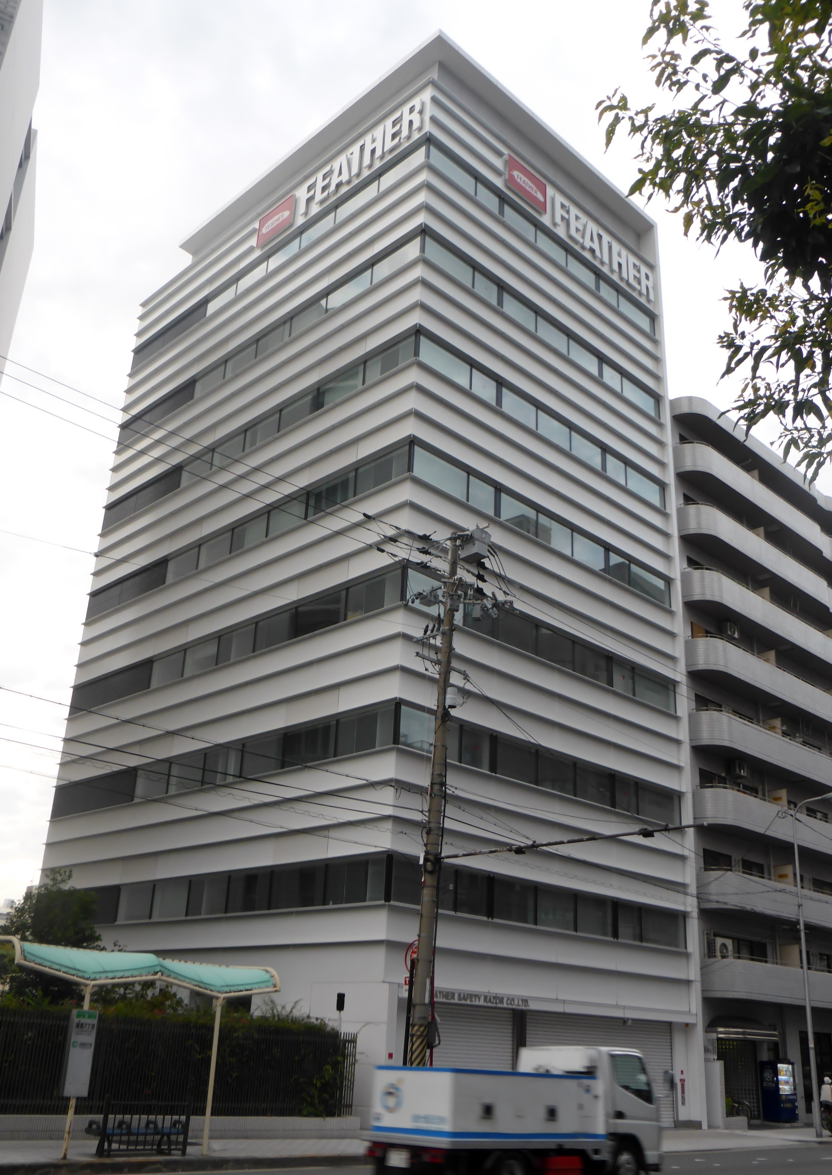 フェザー安全剃刀株式会社本社を撮影。